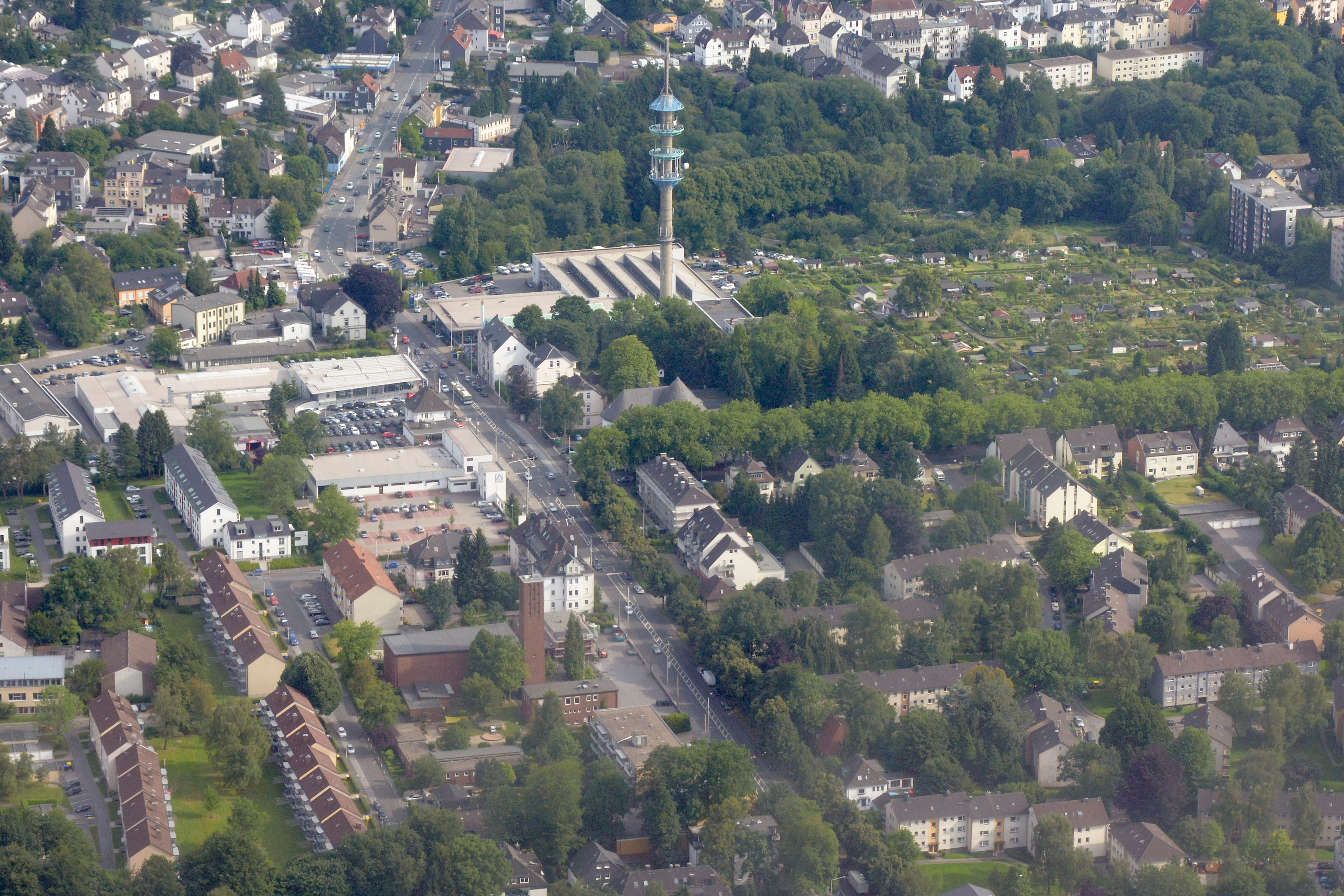 Solingen; Schlagbaumer Straße mit Fernmeldeturm Solingen